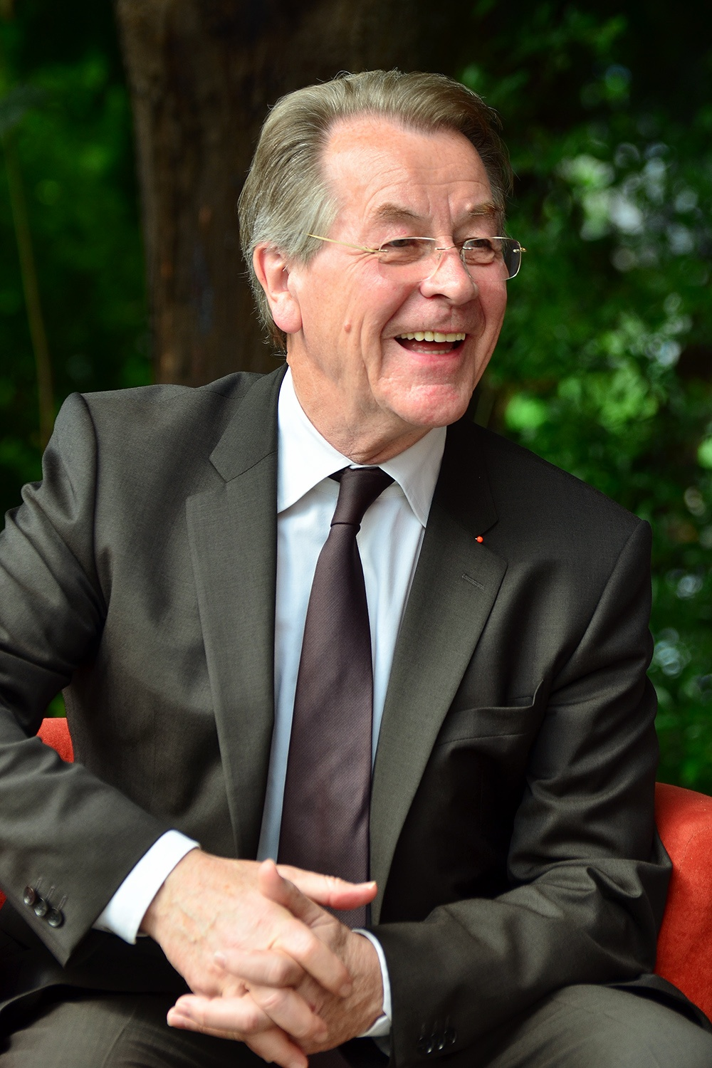 Sommerfest der SPD Hamm, Datum/Uhrzeit: 05.07.2013 17:26:45